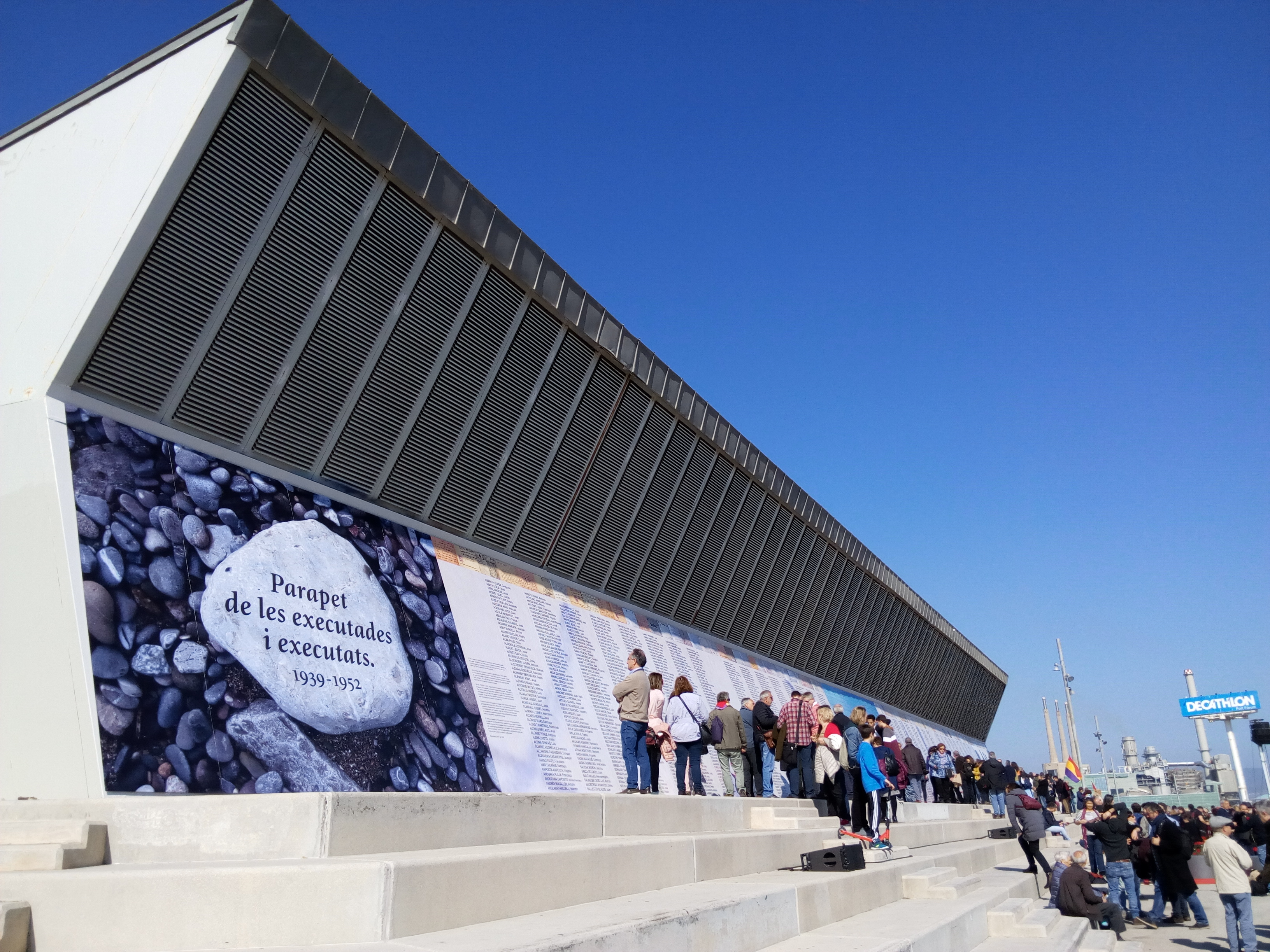 Monument inaugurat el 24 de febrer de 2019 en el lloc on hi va haver el Camp de la Bota, en el límit entre Barcelona i S. Adrià del Besòs, en record i homenatge a les més de 1700 persones executades durant el franquisme, la majoria en aquest lloc. Els seus noms estan inscrits en el mur. Es obra de l'artista Francesc Abad